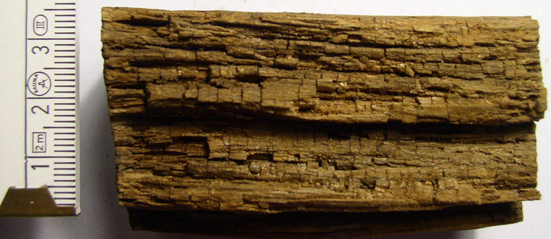 Durch Moderfäule geschädigtes Holz